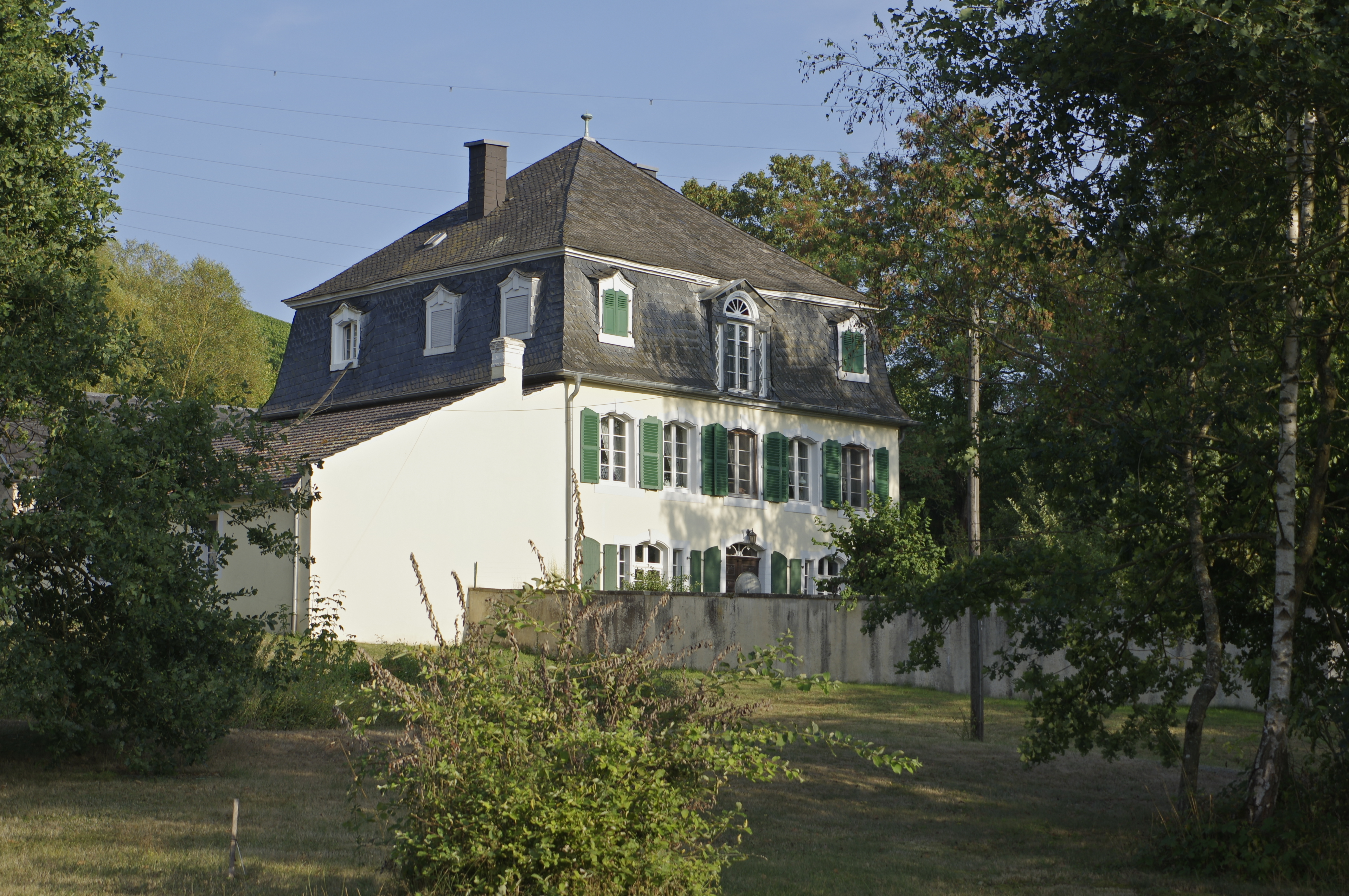 Wiltingen, nördlich des Ortes an der K 133, Rauhof, ummauertes Weingut, Mansardwalmdachbau, 1755, Architekt Christian Kretzschmar